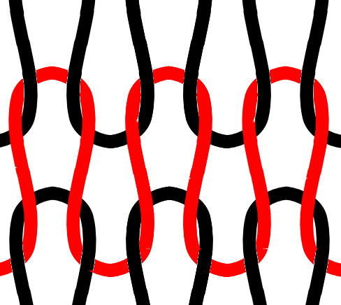 Schéma de mailles